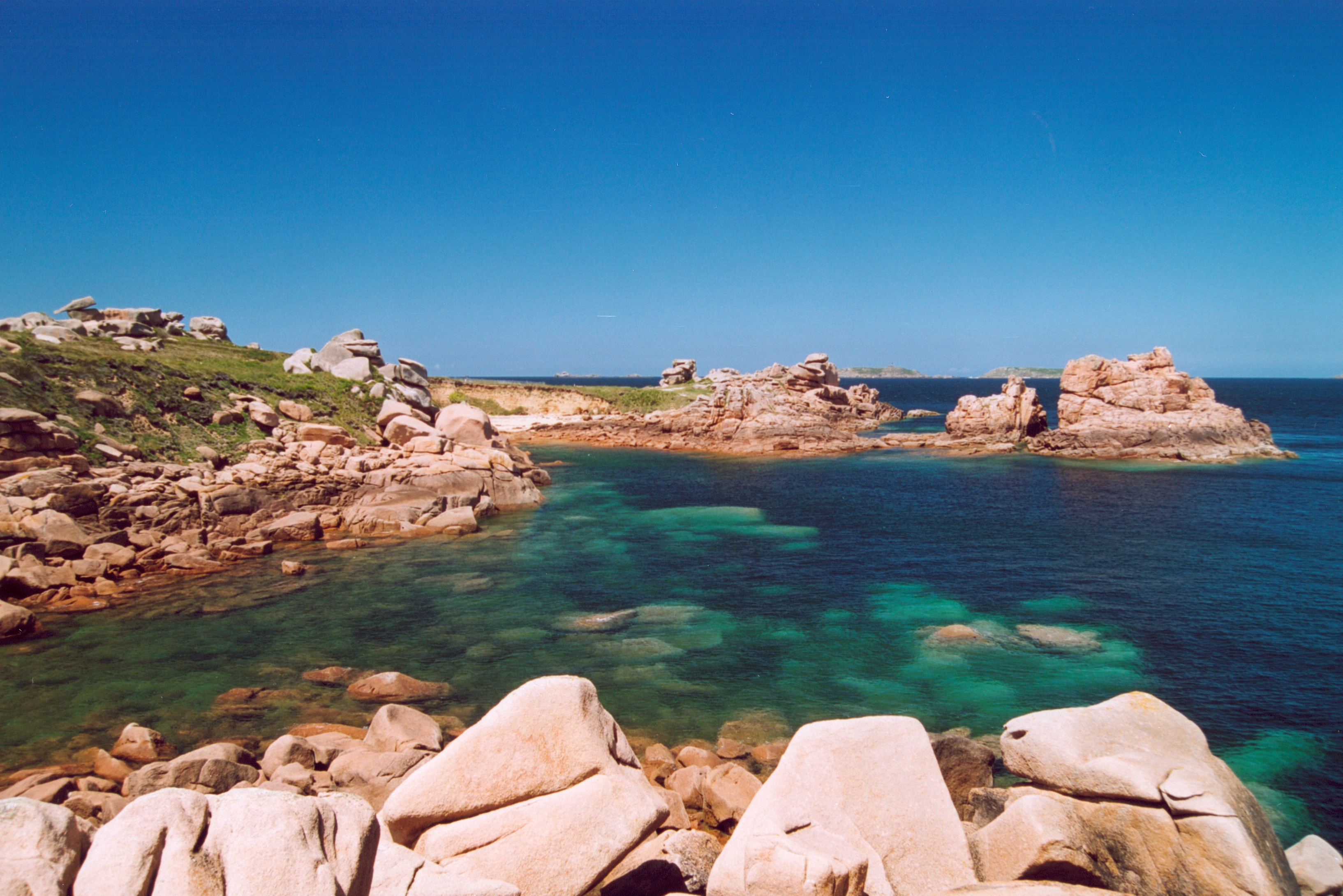 France Bretagne Côtes d'Armor Côte de granit rose